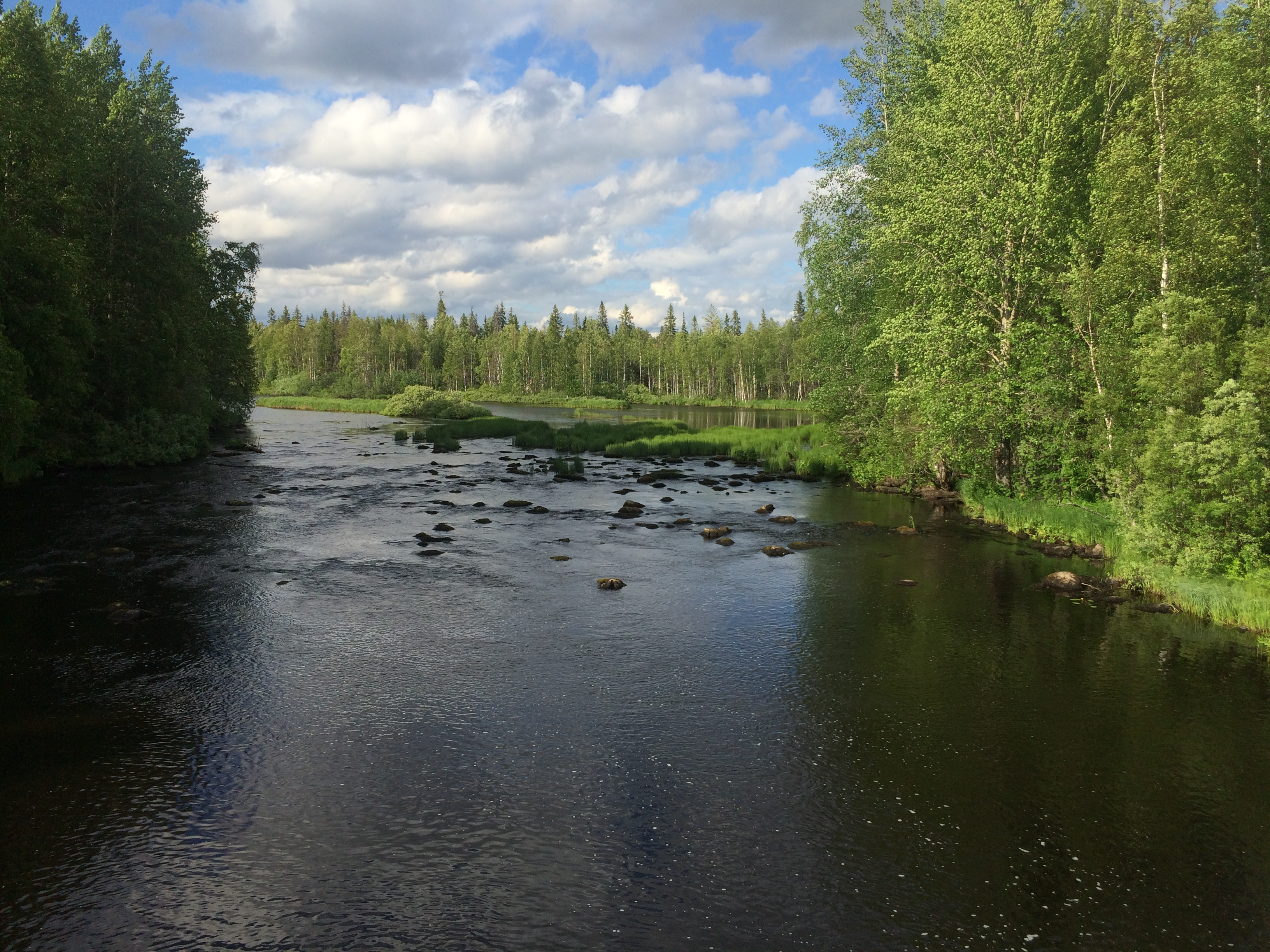 Вожма (река, впадает в Выгозеро)